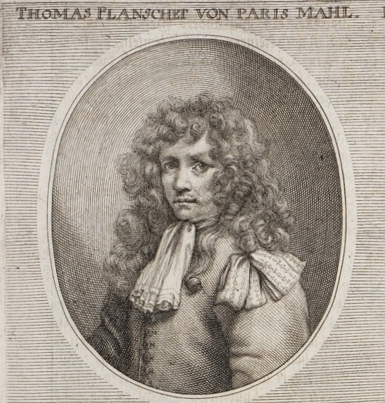 Thomas Blanchet in Teutsche Academie, légende : THOMAS PLANSCHET VON PARIS MAHL.